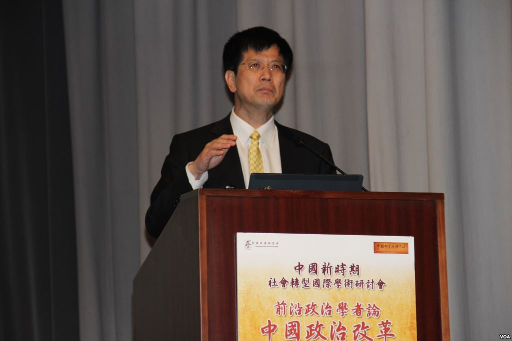 Keping Yu 俞可平（美国之音海彦拍摄）